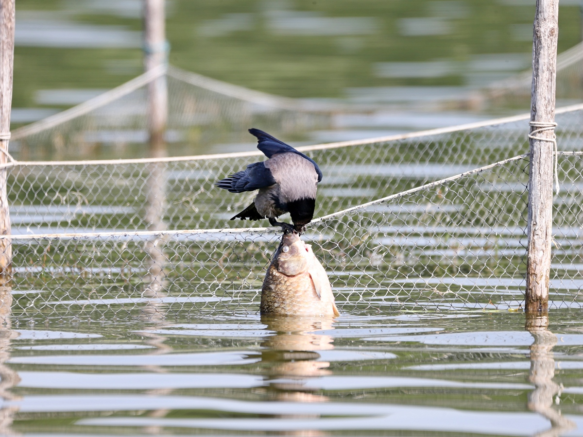 Nebelkrähe, die sich im Malchiner See einen toten Giebel aus dem Wasser gezogen hat.